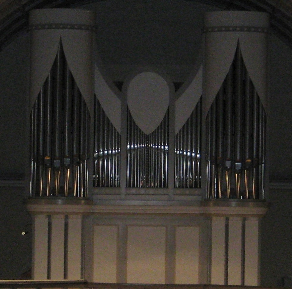 Die Orgel in der evangelischen Kirche in Wilnsdorf.